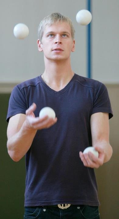 Kouzelník_Zdeněk_Bradáč_Rekord